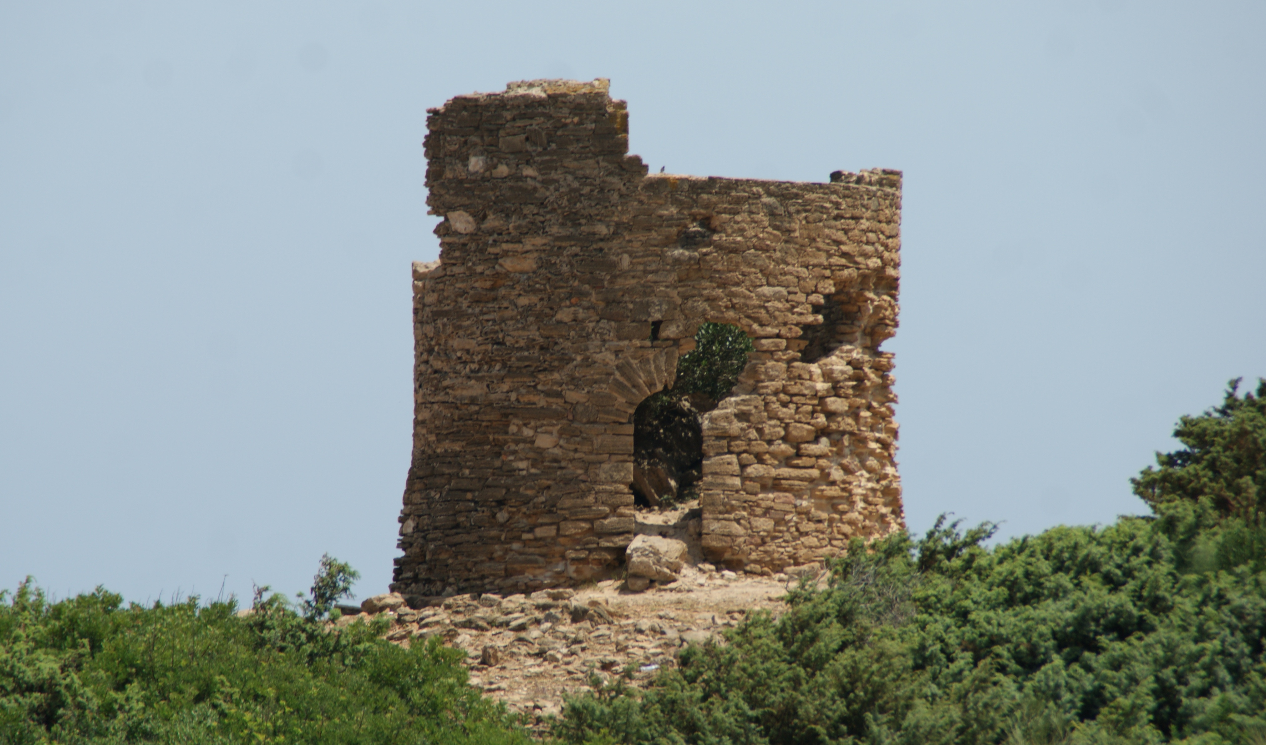 Ruines du Bastion de France